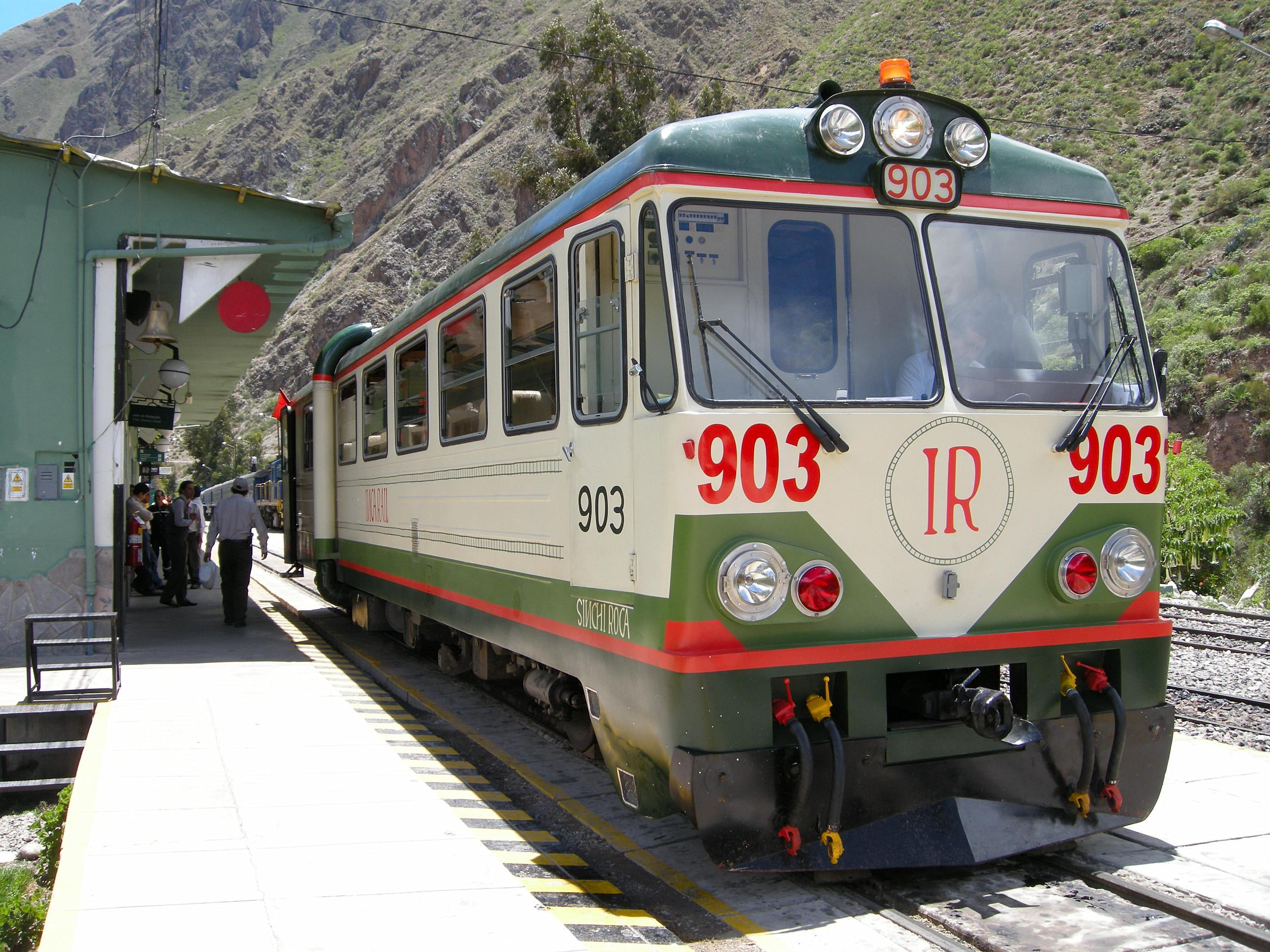 Inca Rail, nuevo tren Ollantaytambo/Machu Picchu